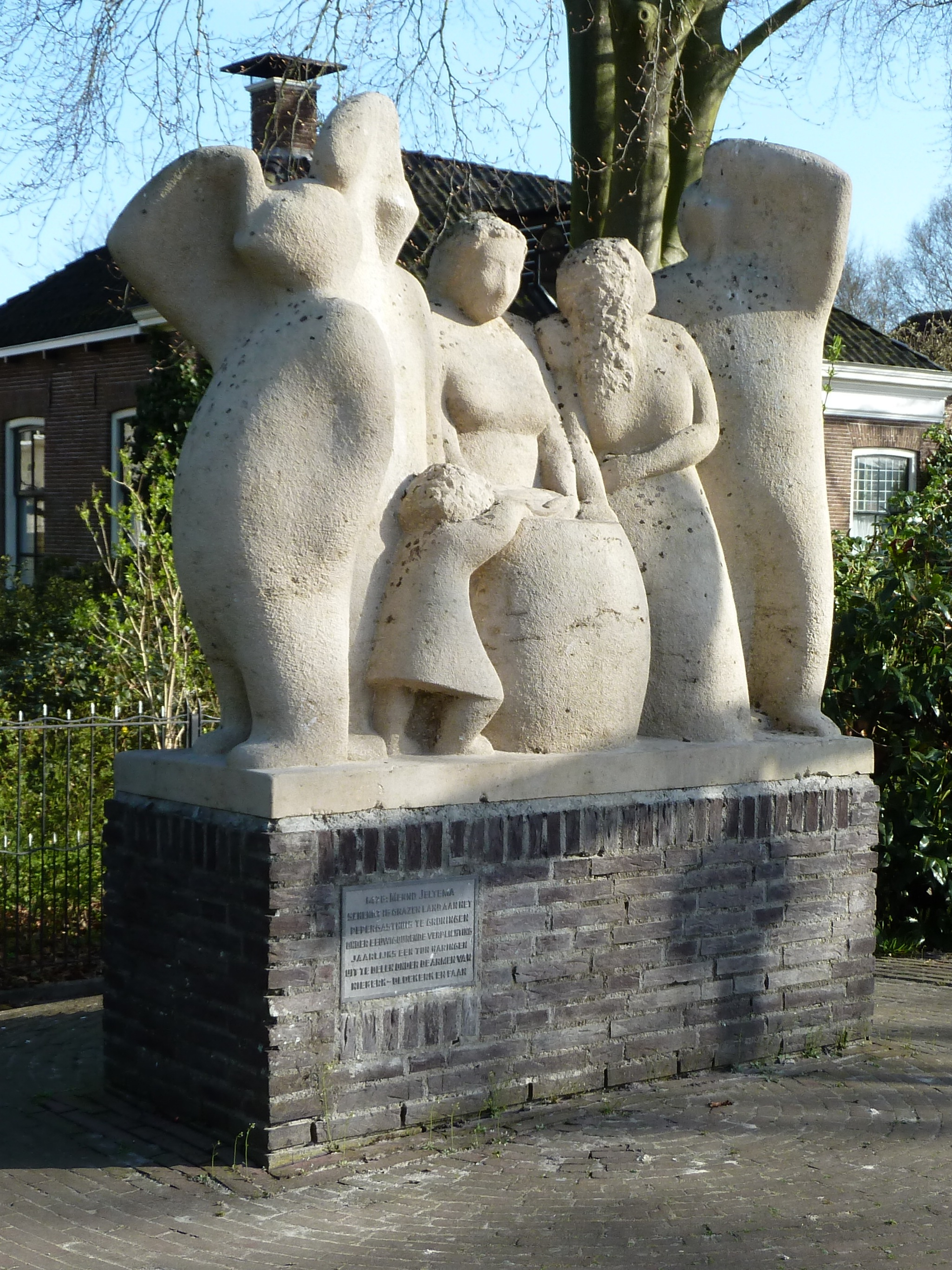 Kunstwerk 'De Haringeters' voor de hervormde kerk van Niekerk (Grootegast, Groningen, Nederland). Geplaatst in 1983. Gemaakt door beeldhouwer Harm Blanken uit Nuis.